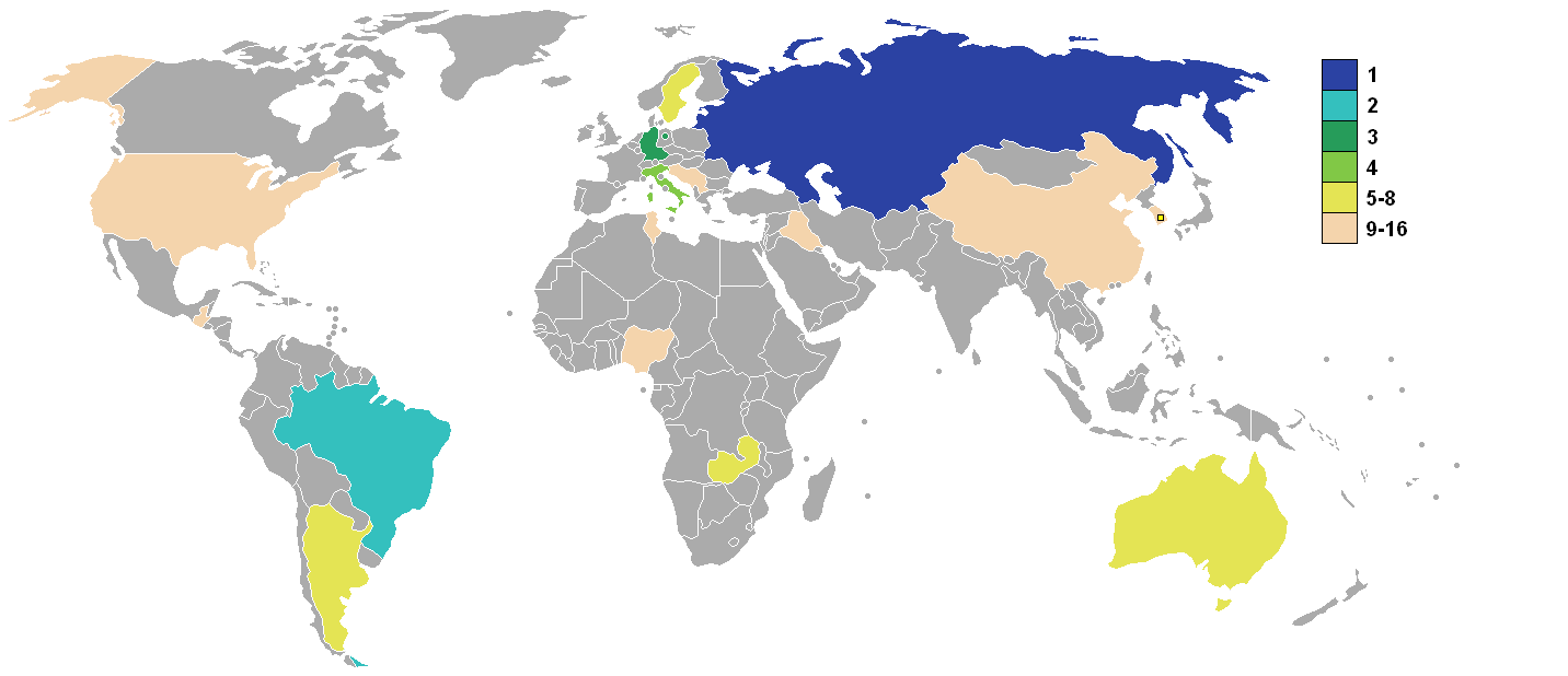 Classement après l'épreuve de football aux Jeux olympiques de 1988